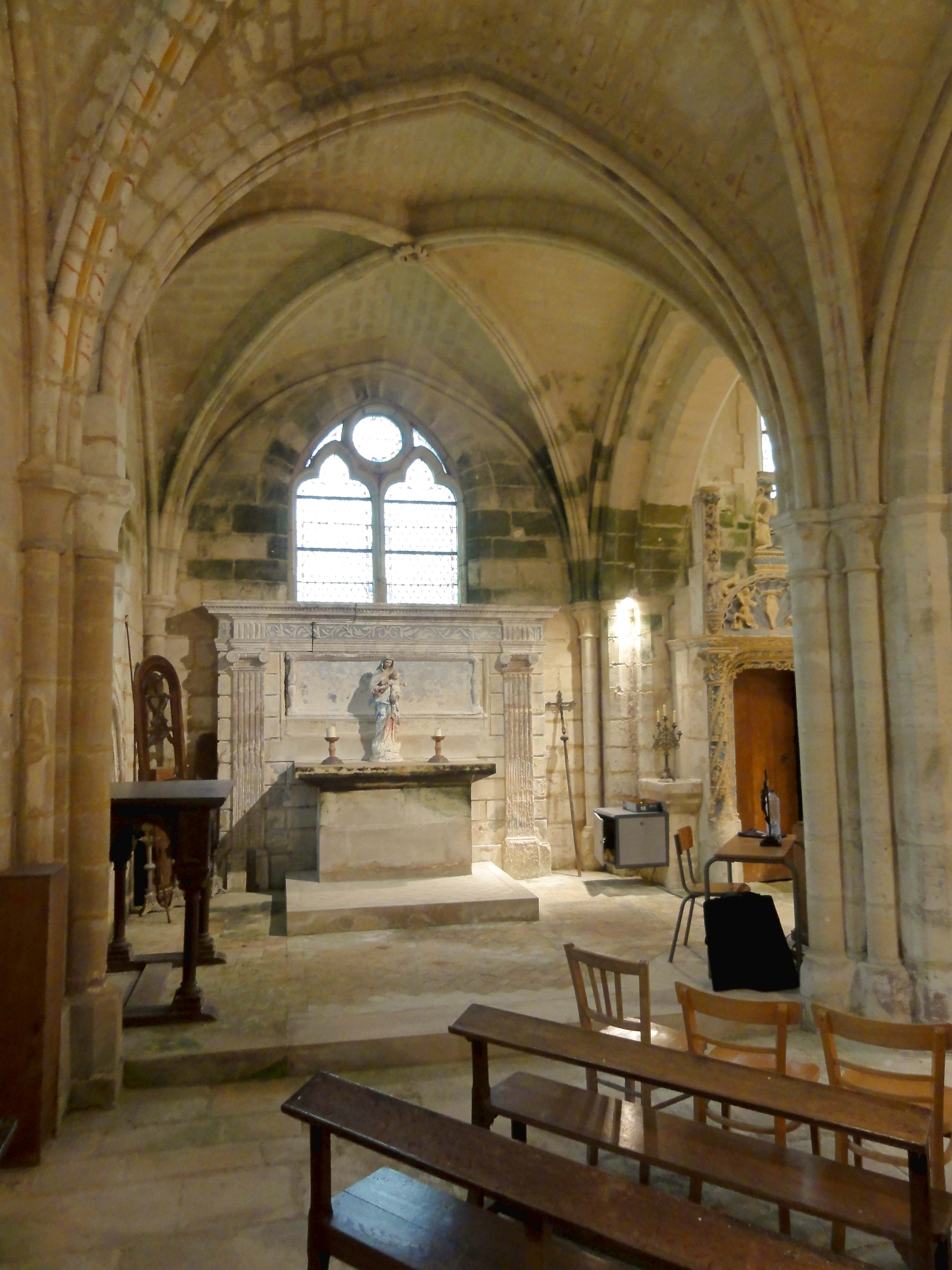 Intérieur de l'église - voir titre.